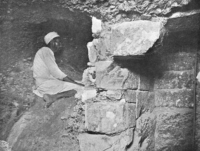 la grotte dans la pyramide de Khéops